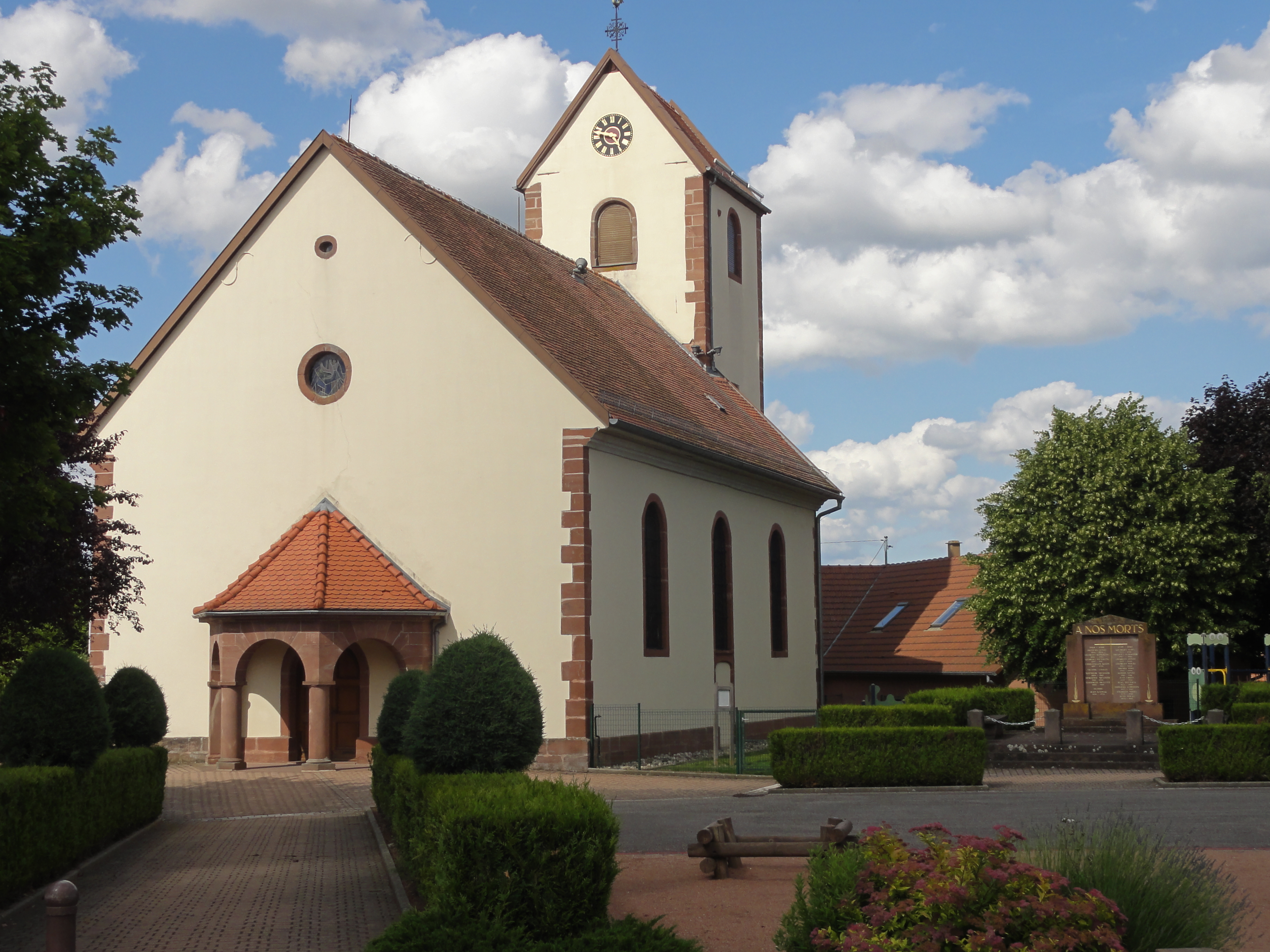 Alsace, Bas-Rhin, Ringendorf, Église protestante (XIIIe-XVIIIe)